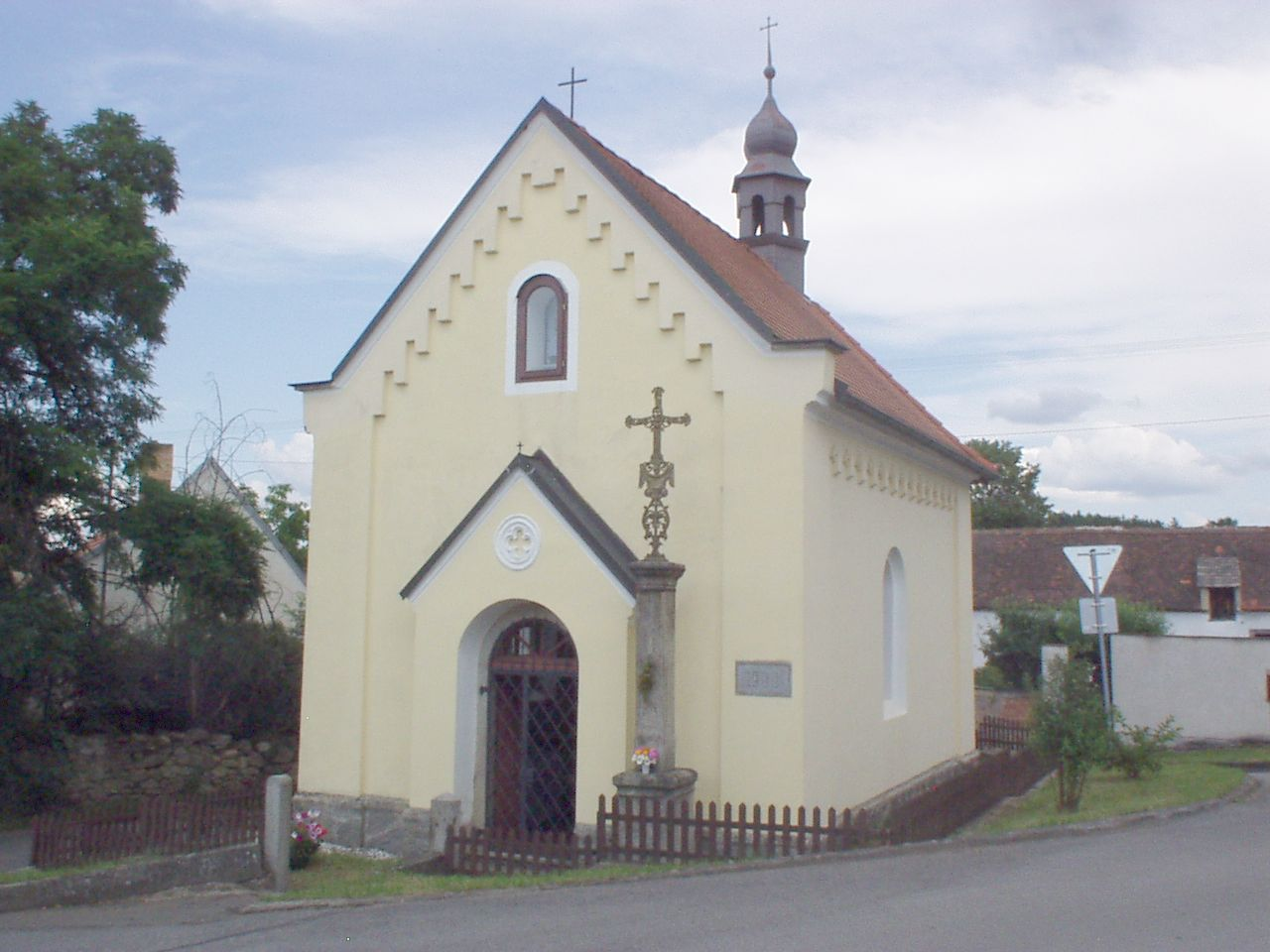 kaple v Doubravici, okres Strakonice